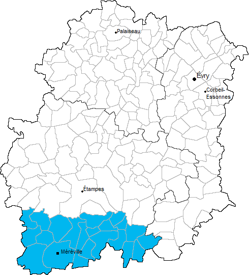 Carte de localisation du canton de Méréville en Essonne (91)